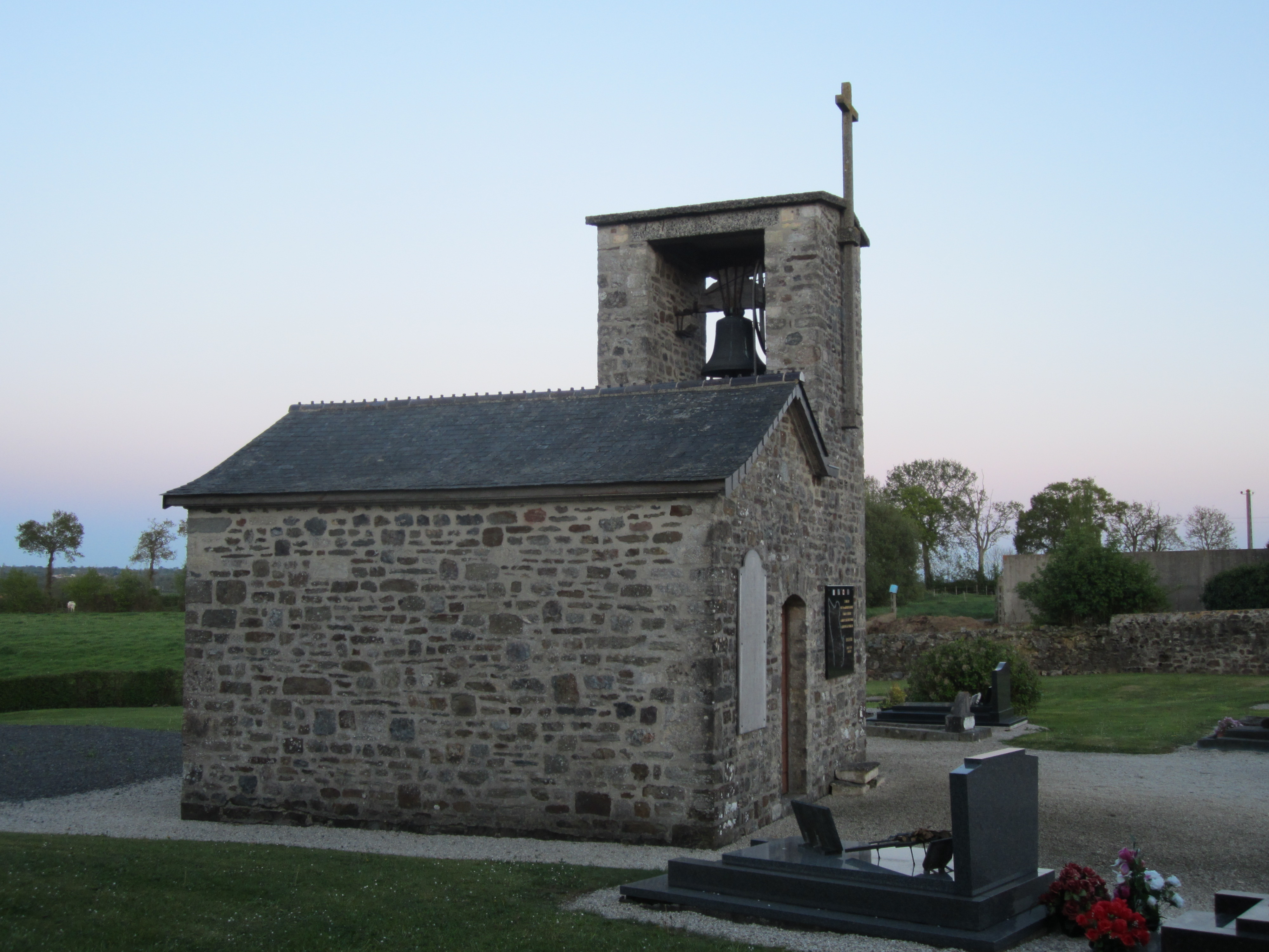 Le Mesnil-Durand, Pont-Hebert, Manche